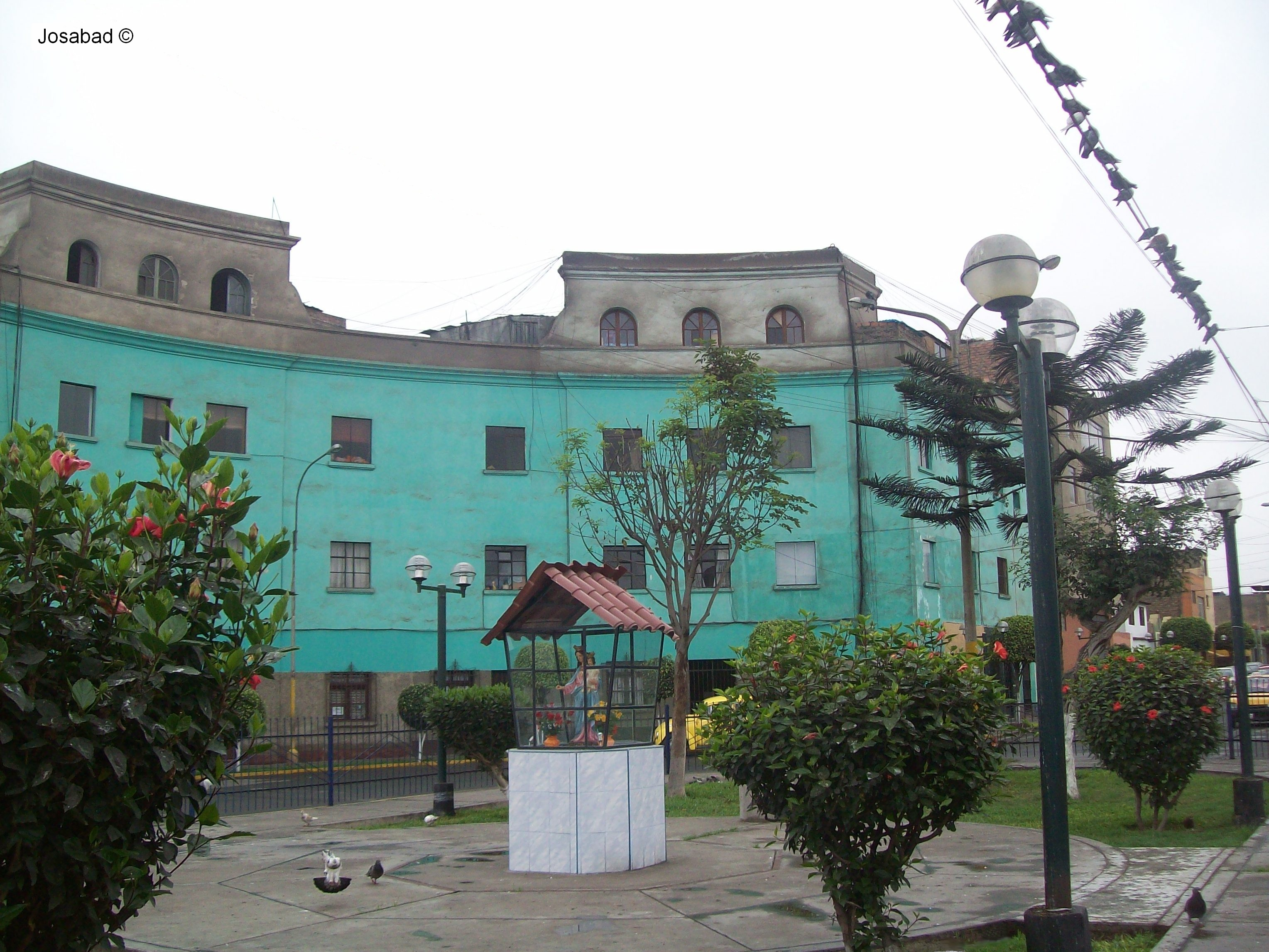 Gruta a la Vírgen María Auxiliadora en el óvalo entre el Jirón Pariacoto y el Jirón Morona.